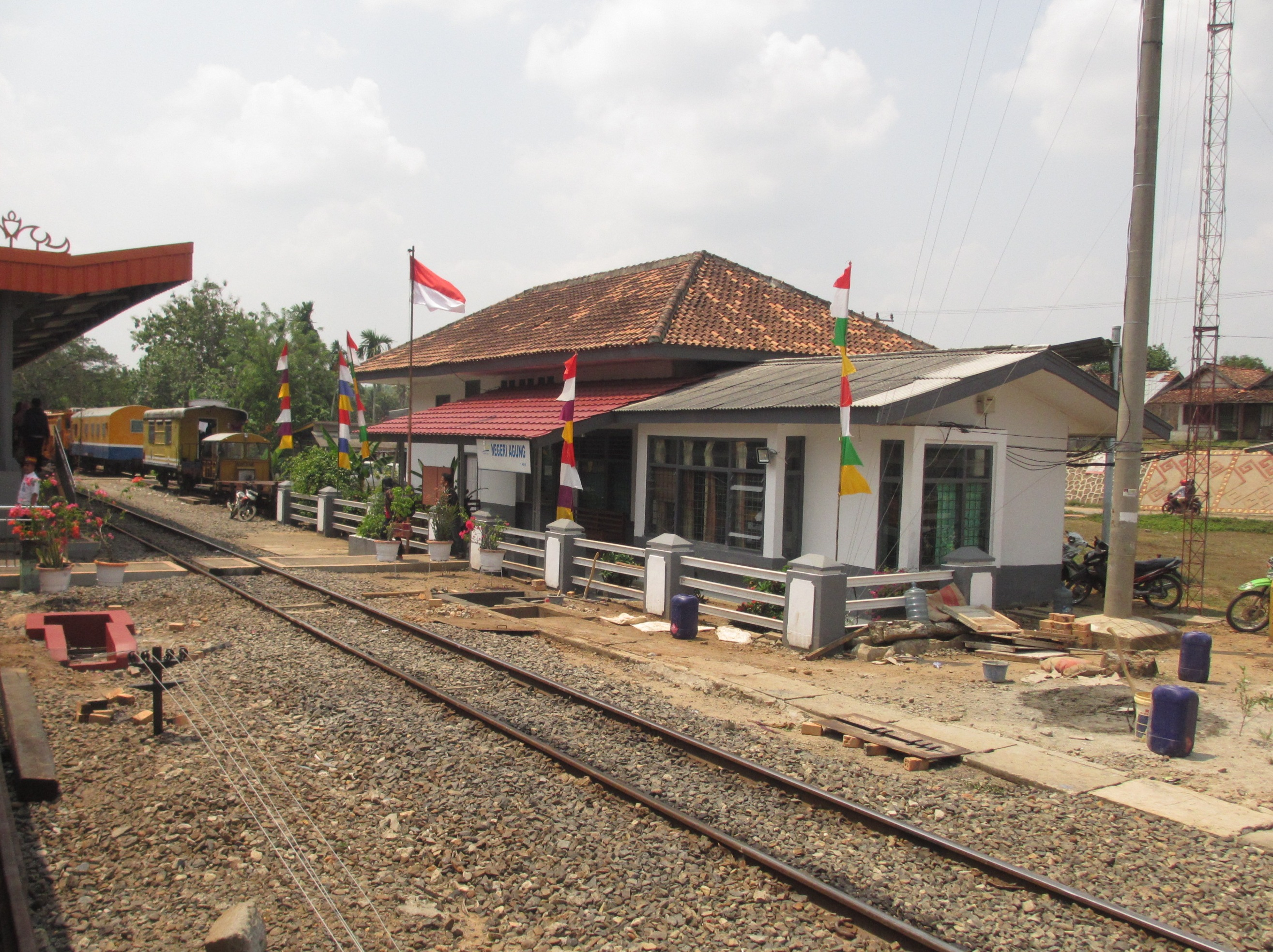 Stasiun Negeriagung.